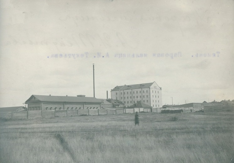 5-этажная мукомольная паровая мельница купца А. И. Текутьева. Построена в 1893 году, находилась на перекрёстке улиц Холодильной и Республики, на месте офиса "Сибнефтепровода".